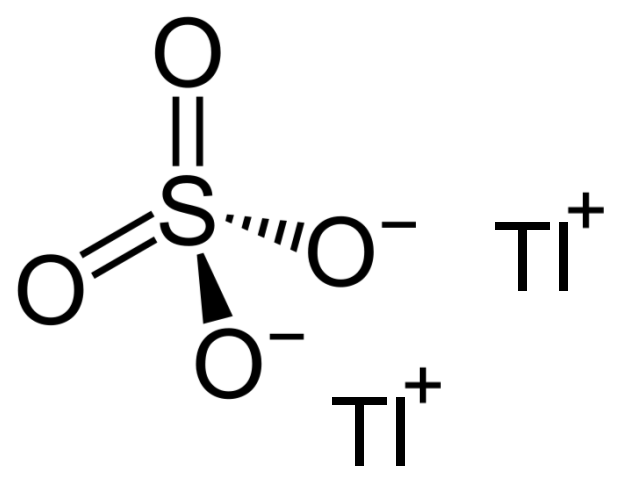 Thallium(I)sulfaat